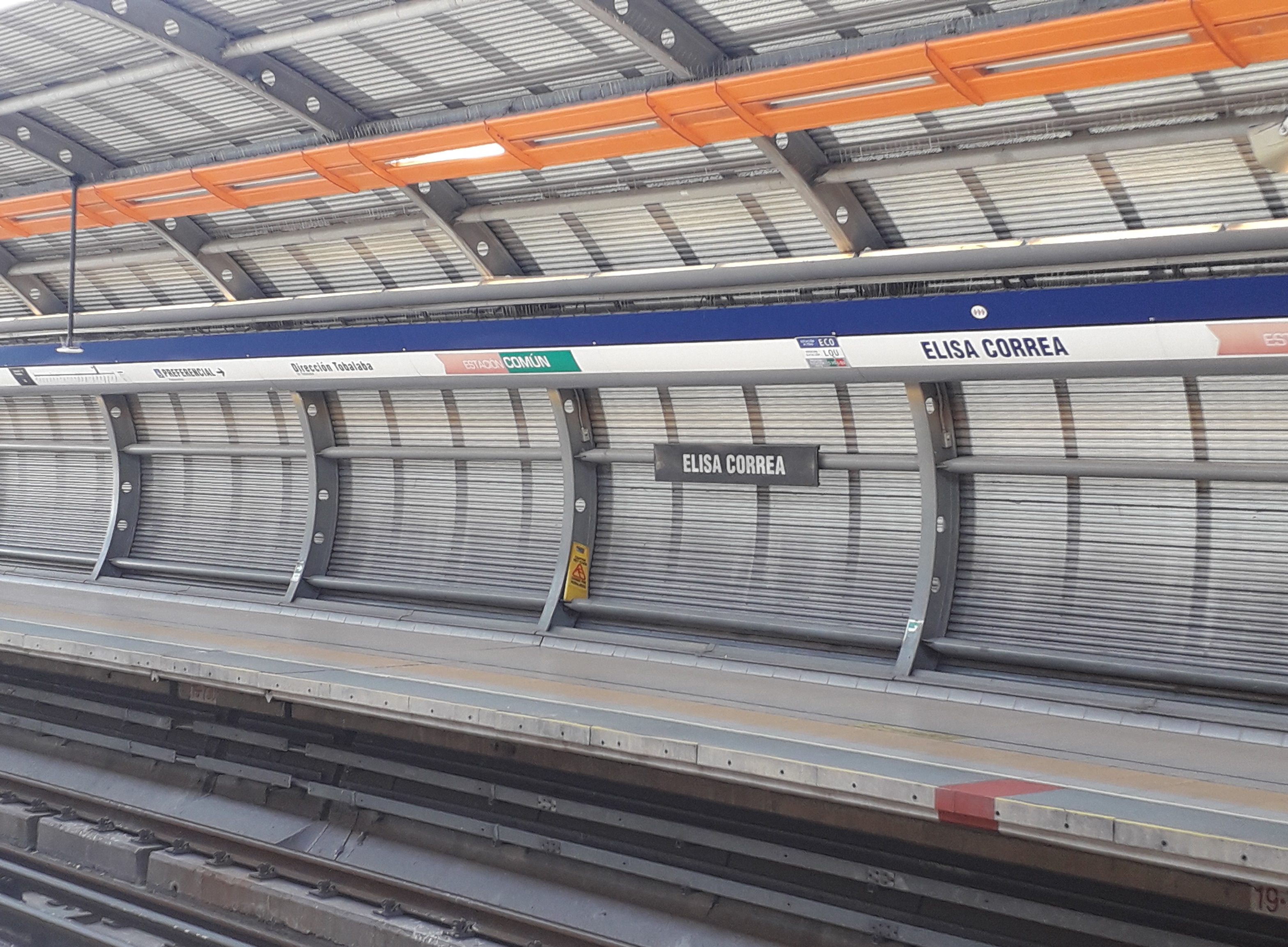 Metro Estación Elisa Correa Línea 4